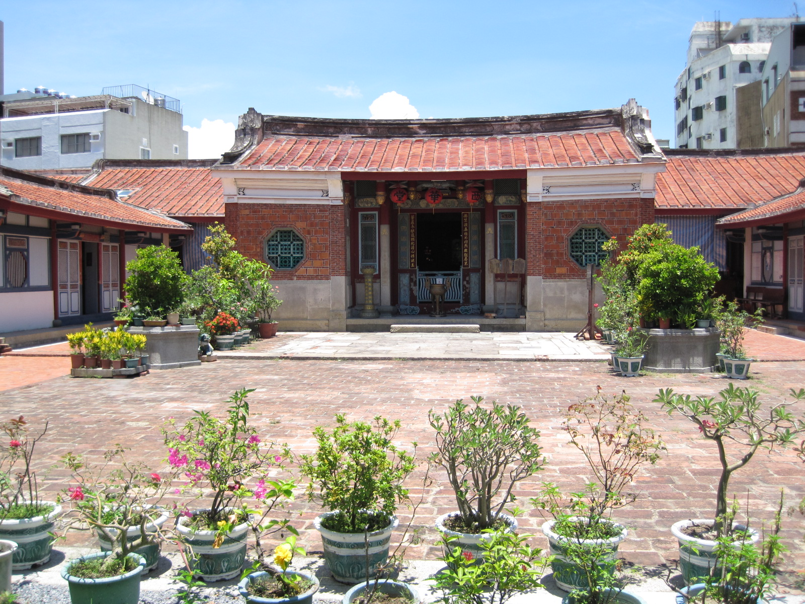 臺南西華堂